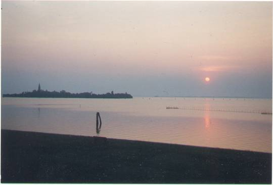 Veduta dell'isola di Poveglia dal Lido